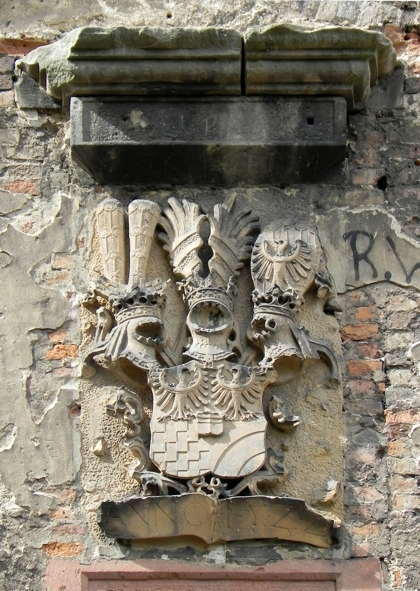 Wappen Karls I. von Münsterberg, darunter Inschrift Anno 1522. Relief über dem Haupteingang im südöstlichen Flügel der Ruine von Schloss Frankenstein, Frankenstein (Ząbkowice Śląskie), Niederschlesien, Polen.